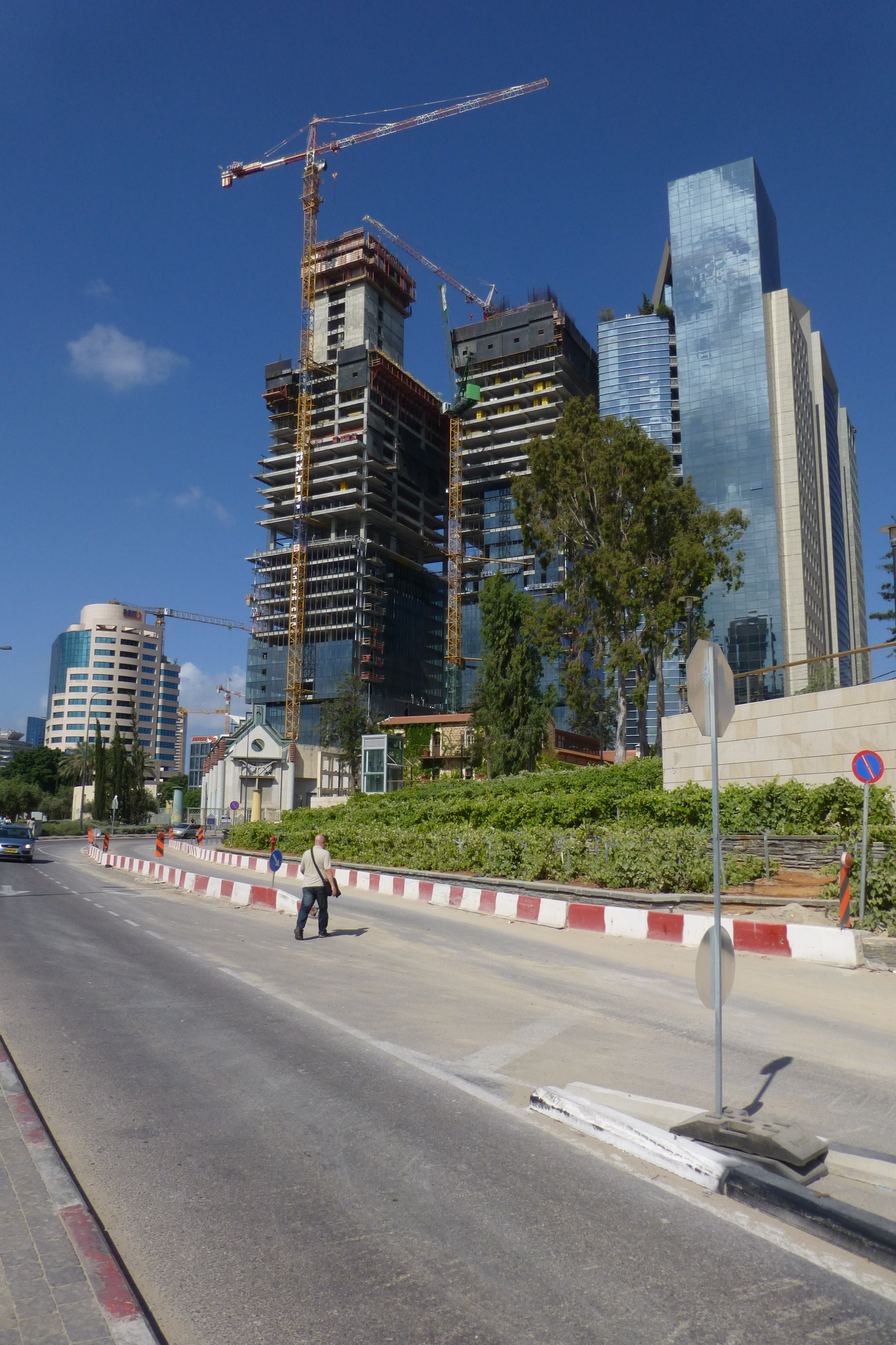 שׂרונה היא המושבה הרביעית שהקימו הגרמנים הטמפלרים בארץ ישראל במחצית השנייה של המאה ה-19. המושבה הוקמה ארבעה קילומטרים צפונית ליפו, ואחרוני בתיה שוכנים כיום בתל אביב בין שדרות שאול המלך מצפון, דרך בגין במזרח, רחוב הארבעה מדרום, ומגרשי החנייה של אחוזות החוף ממערב. מקצתם נמצאים היום בתוך בסיס הקריה.